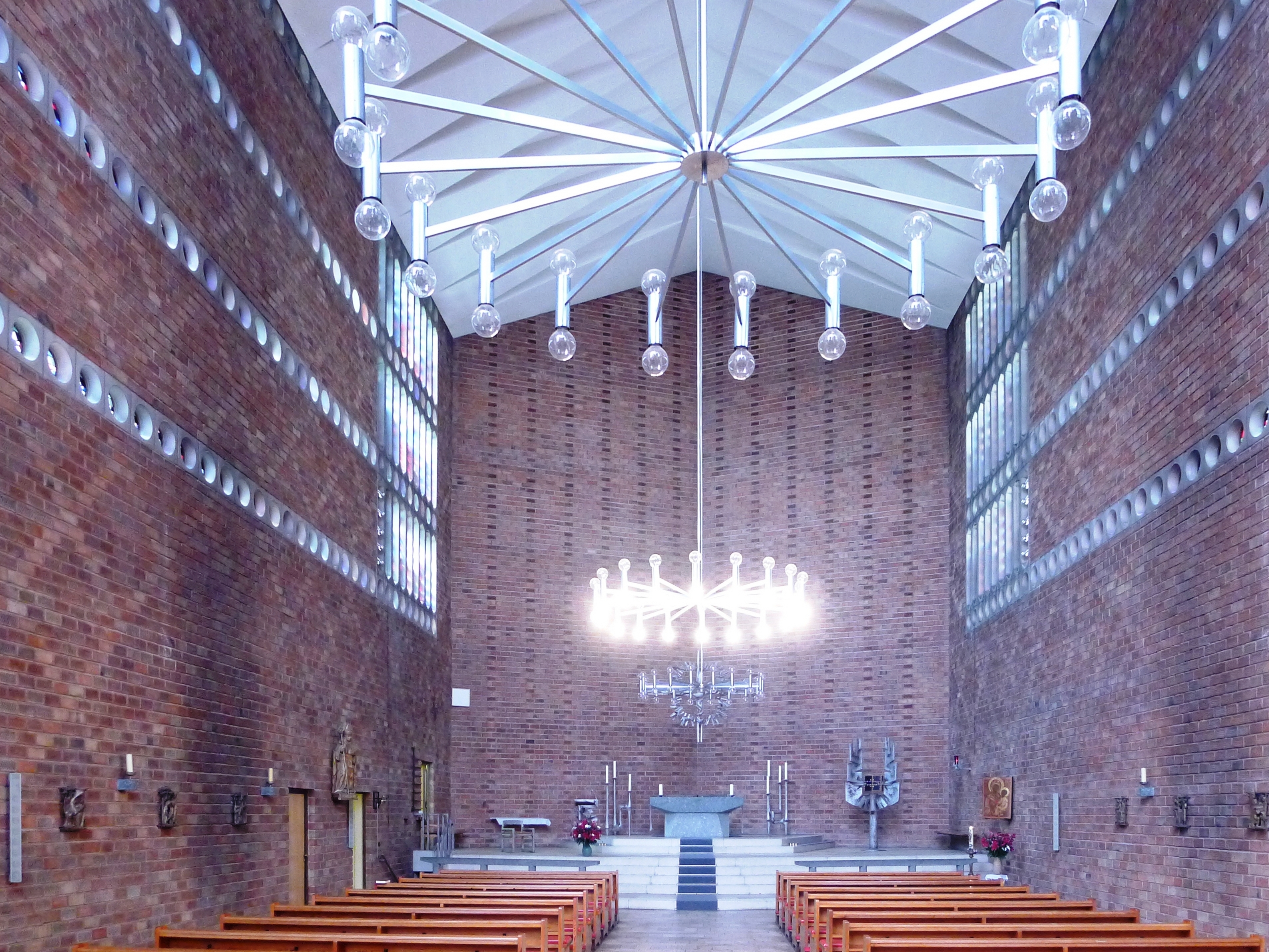 Blick in Richtung des Altars